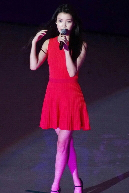 넥슨 던전앤파이터 열파참 10주년 기념행사 현장스케치 (IU)